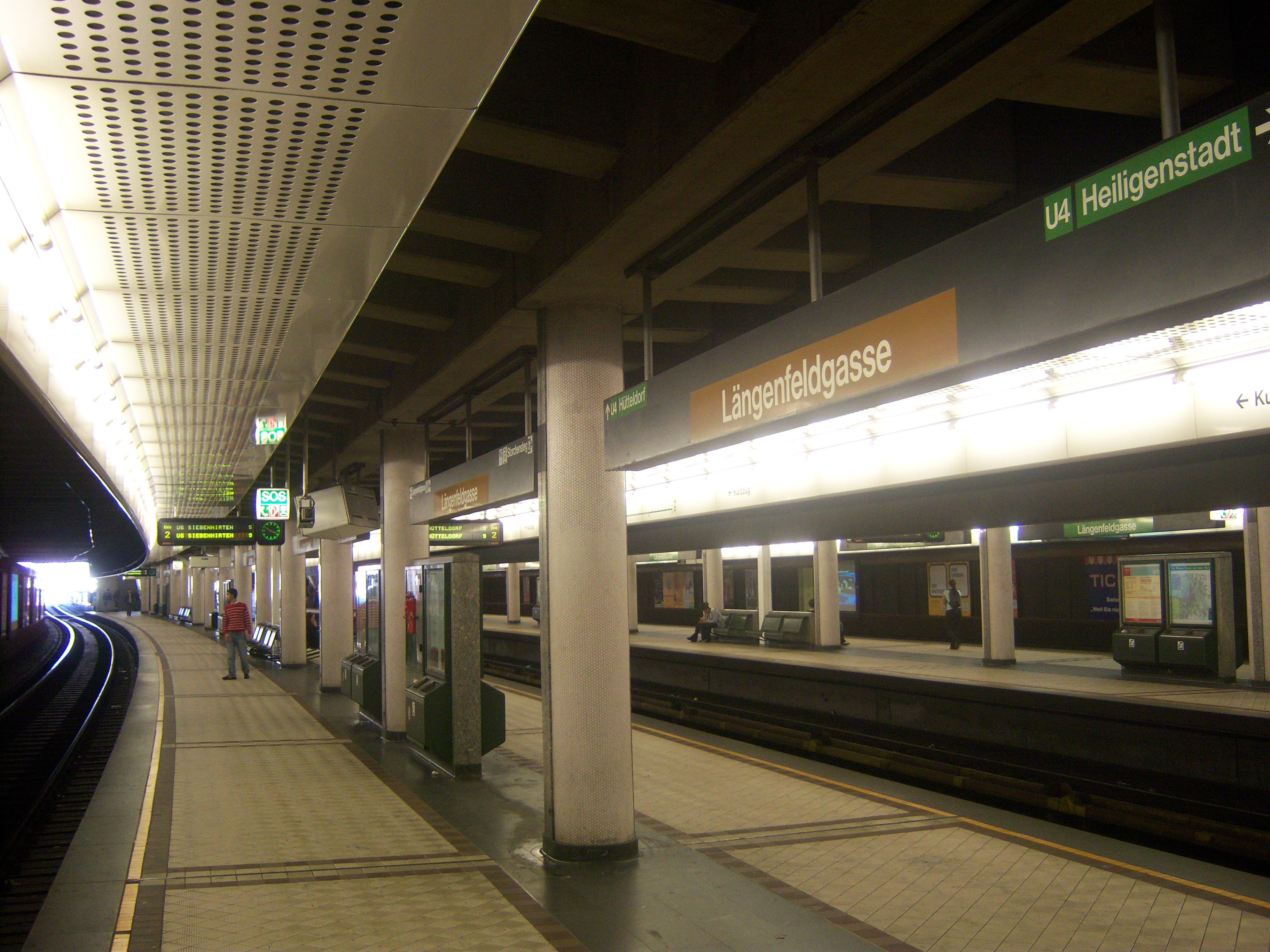 U4/U6-Station Längenfeldgasse